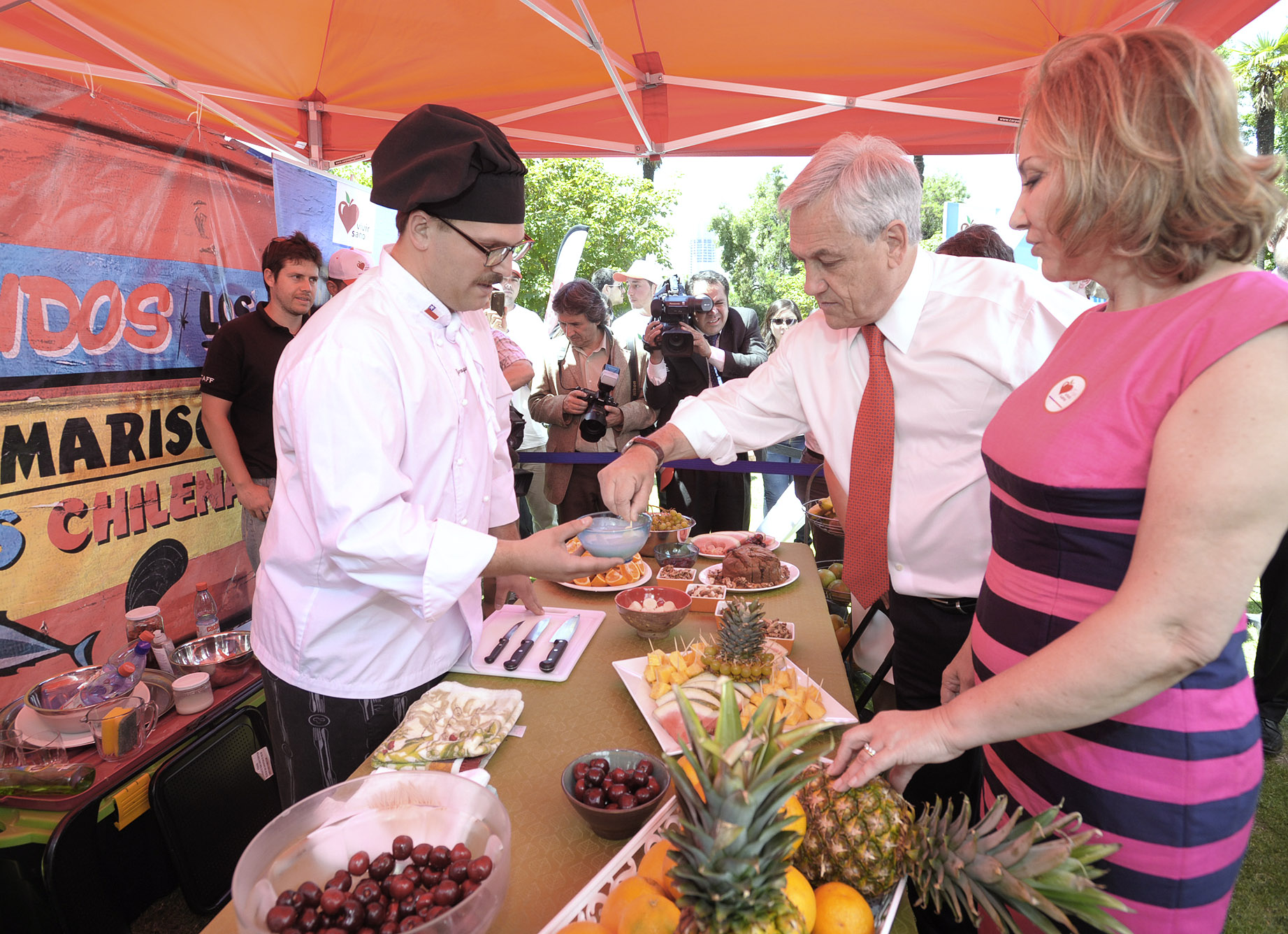 17-12-2012 Sistema Elige vivir sano